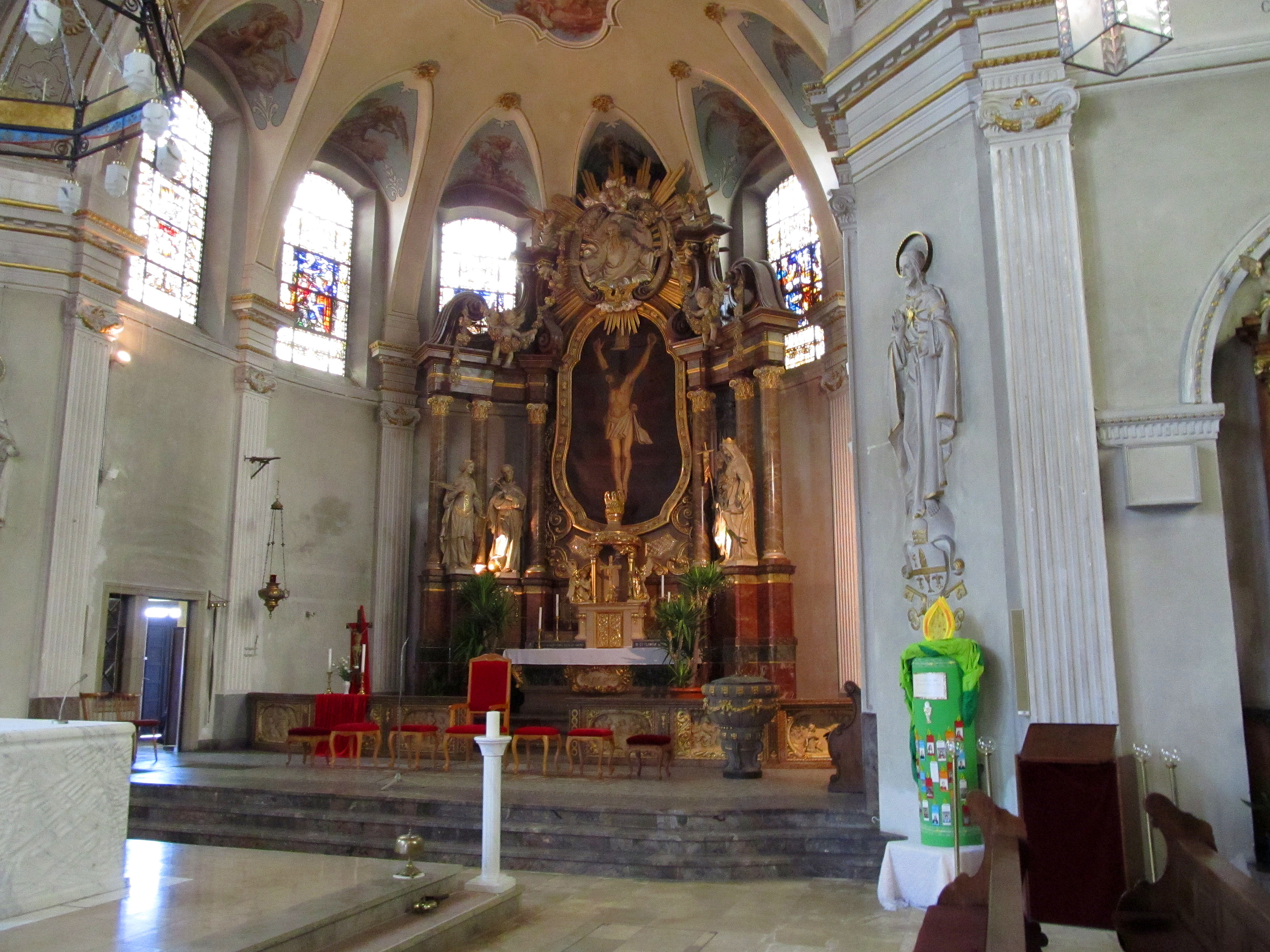 Altarraum der katholischen Pfarrkirche Hl. Dreifaltigkeit in Wiebelskirchen, einem Stadtteil von Neunkirchen (Saar), Saarland